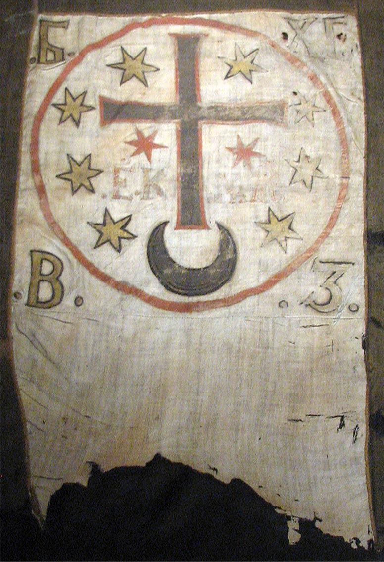 Bohdan Khmelnytsky's banner at Armémuseum, Stockholm, Sweden